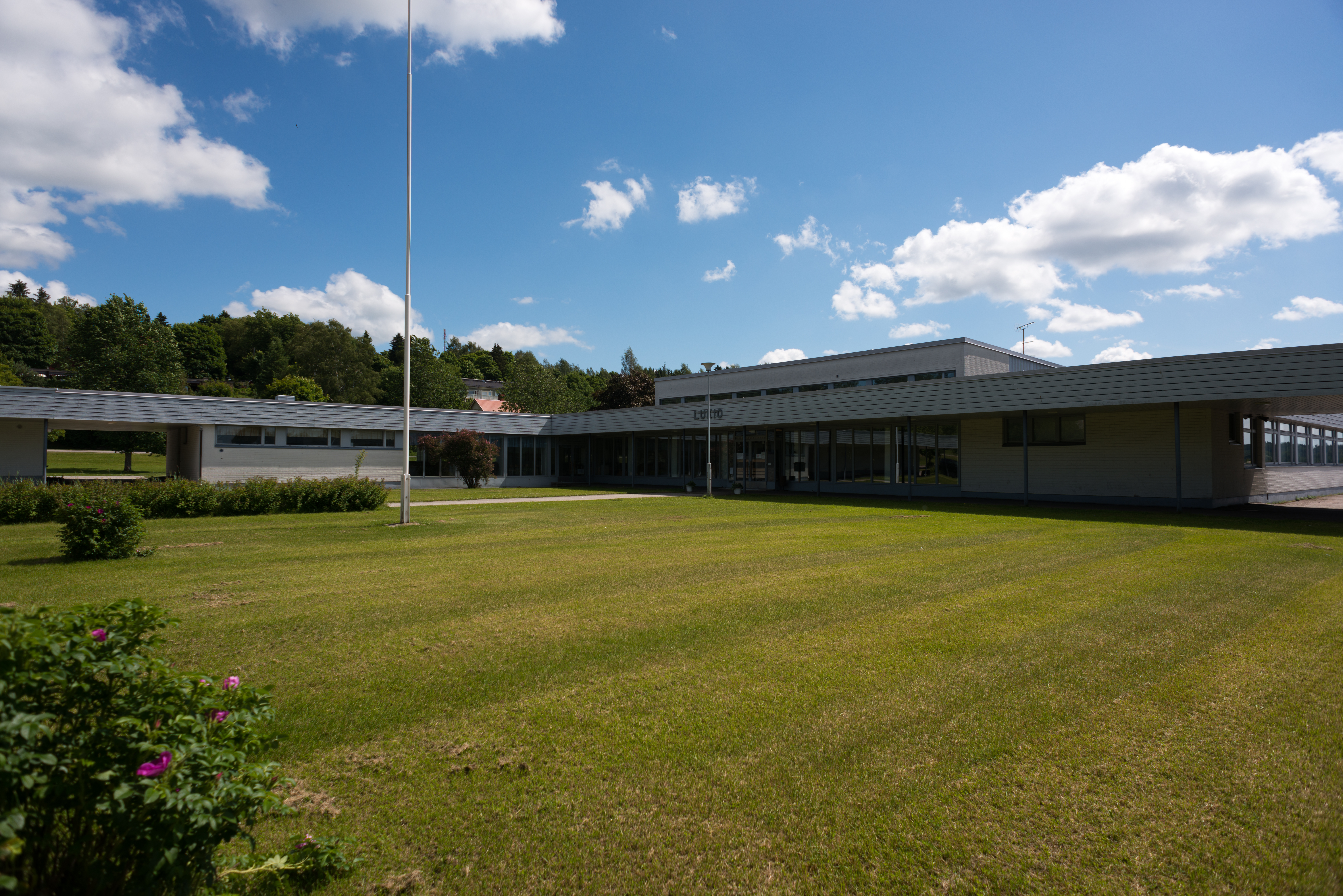 Perniön lukio Perniössä